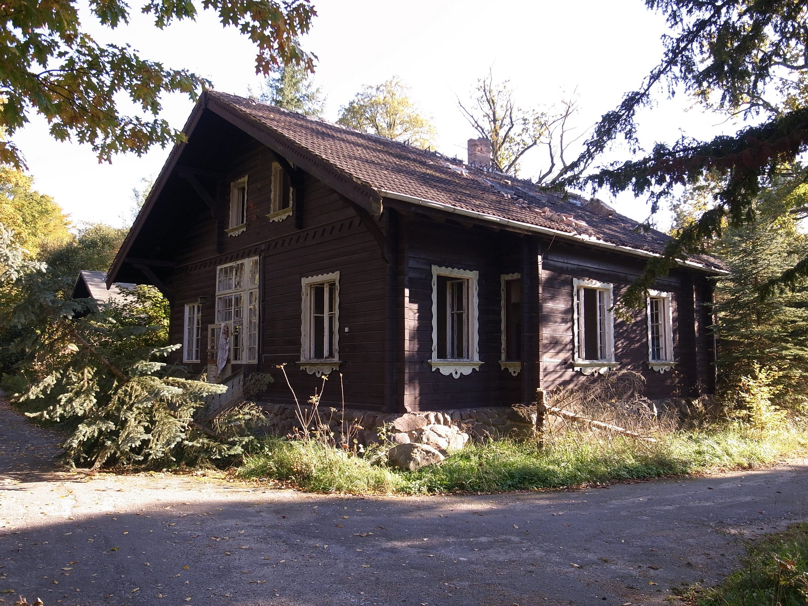 Dessau-Roßlau, Jagdhaus Königendorf (Baudenkmal im Denkmalverzeichniss Sachsen-Anhalt, Erfassungsnummer: 094 40115 000 000 000 000 [1])